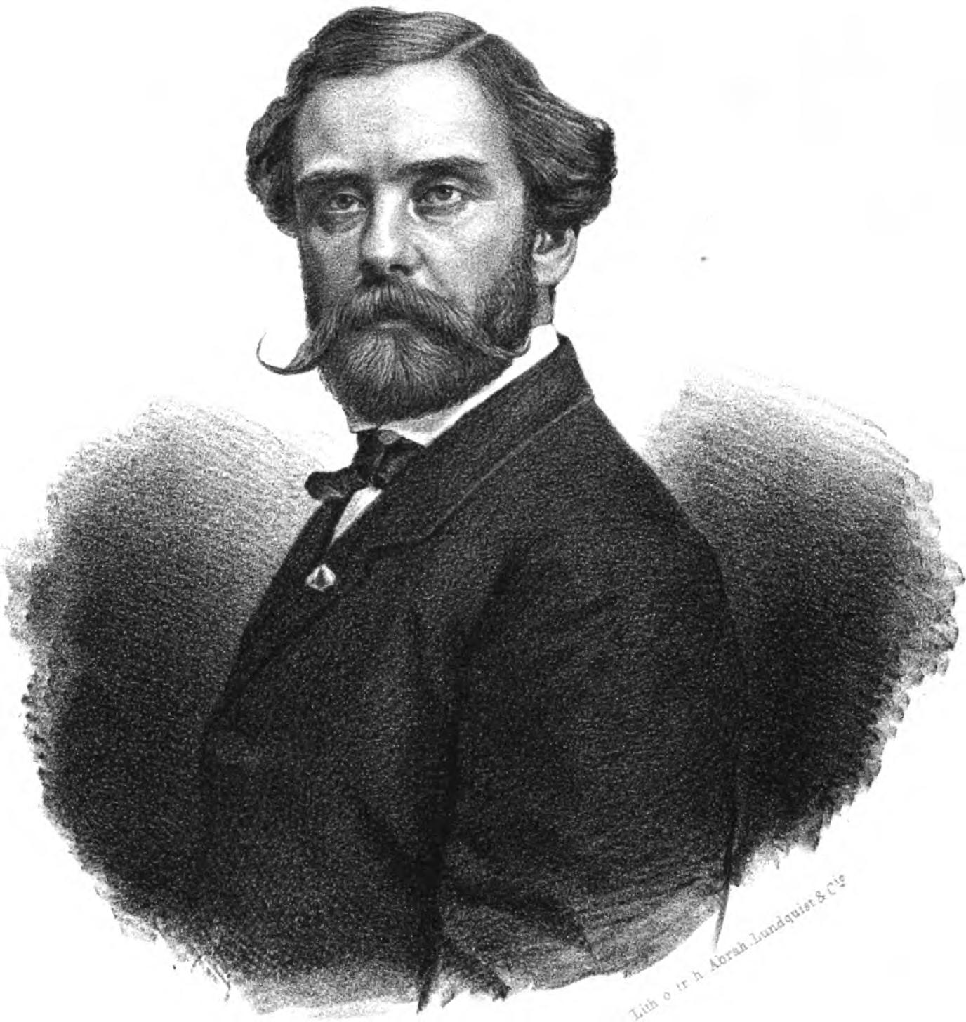 Den svenske målaren Johan Fredrik Höckert.